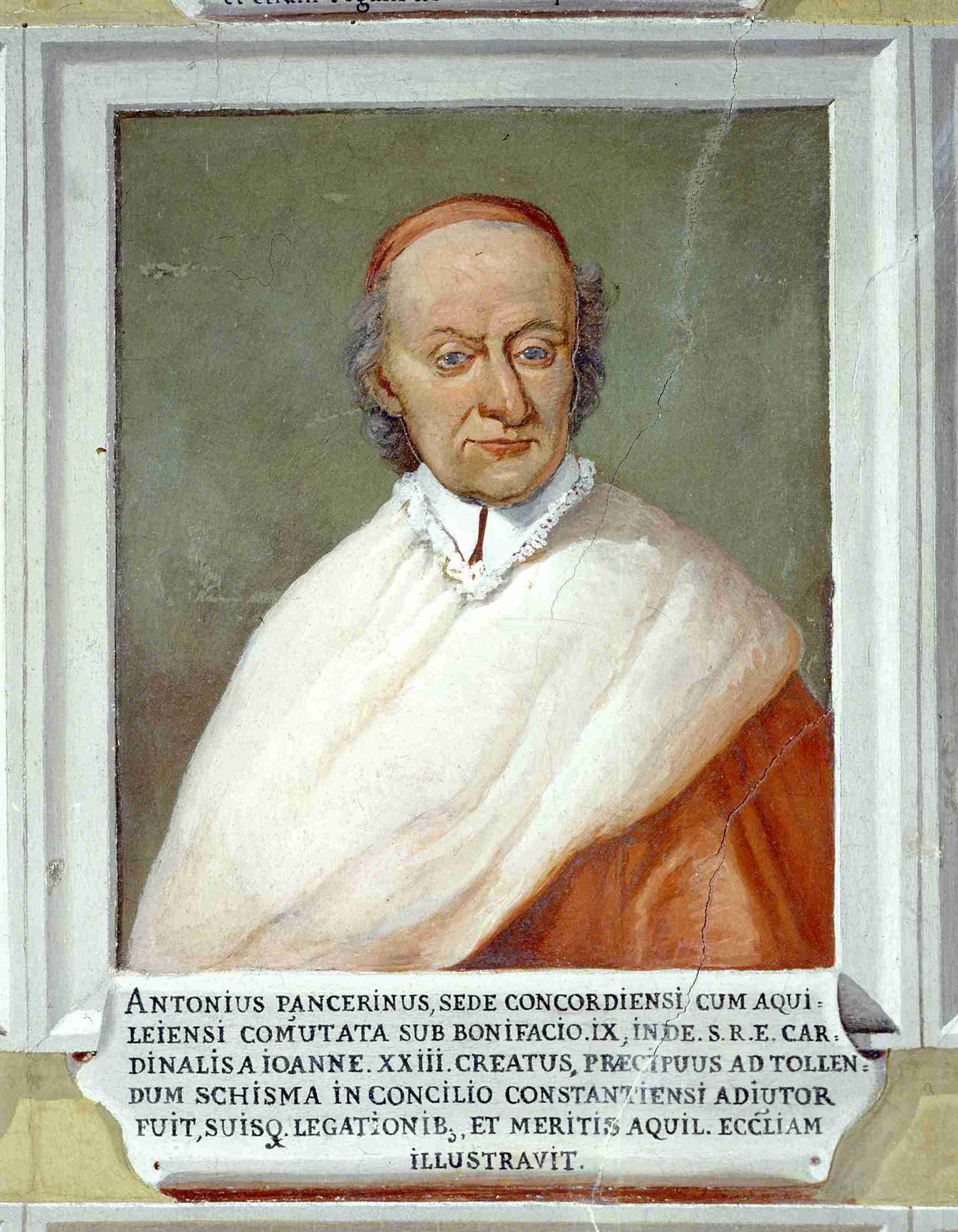 Pancera-Antonio - Patriarcato Udine